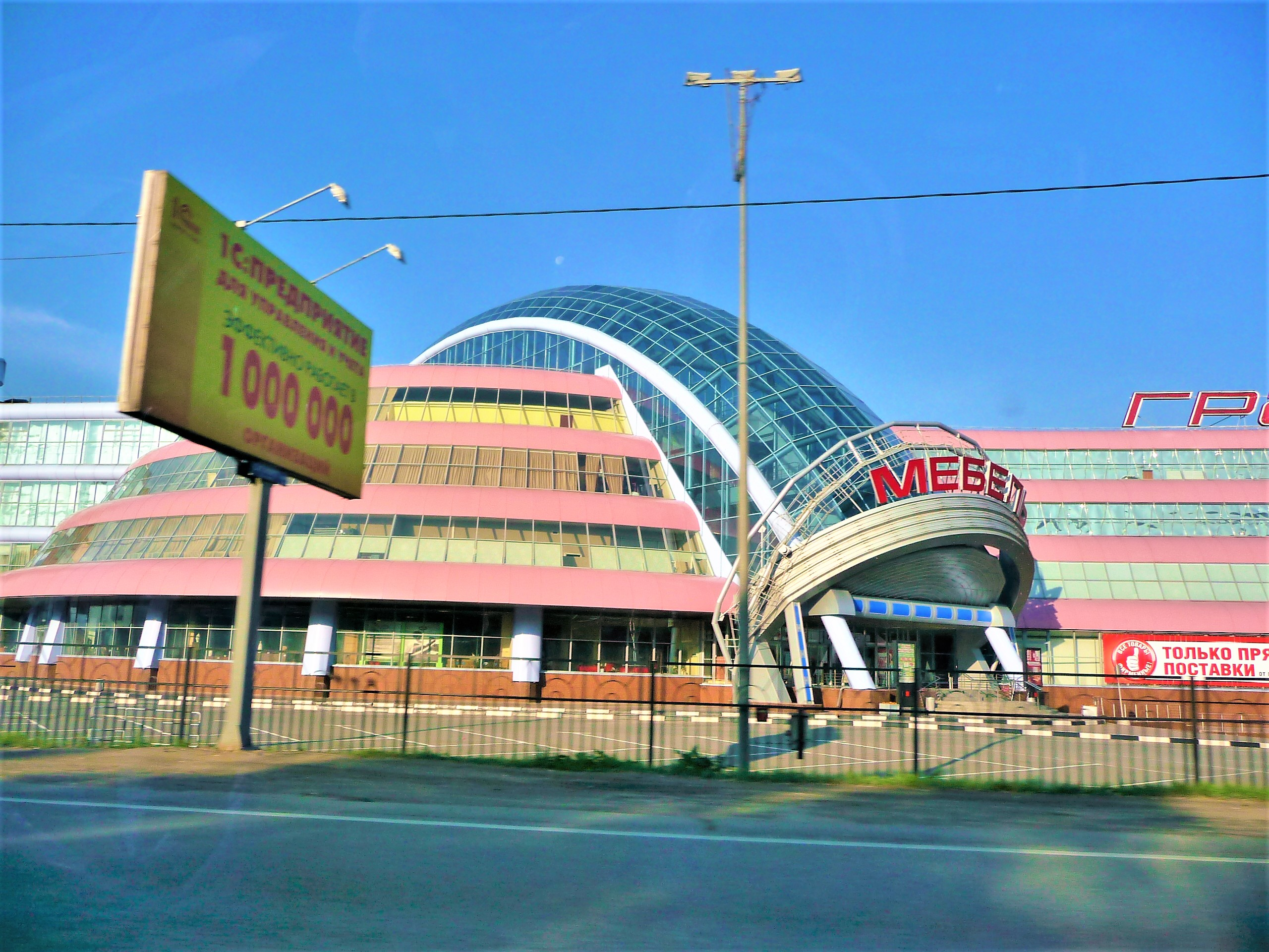 MoscowRegion-p1030205.jpg